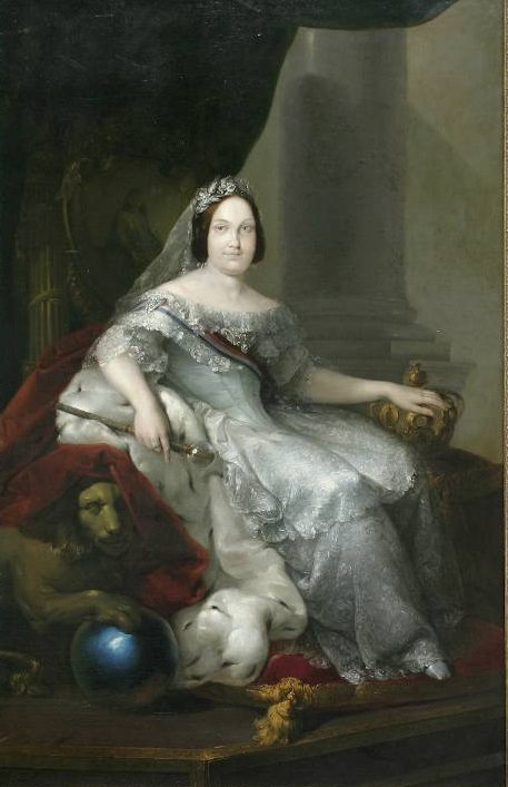 La reina Isabel II de España (1830-1904), aparece retratada con aspecto juvenil, cubierta por un manto de armiño y sentada en un trono. En su mano derecha lleva un cetro, y su mano izquierda está apoyada sobre una corona.